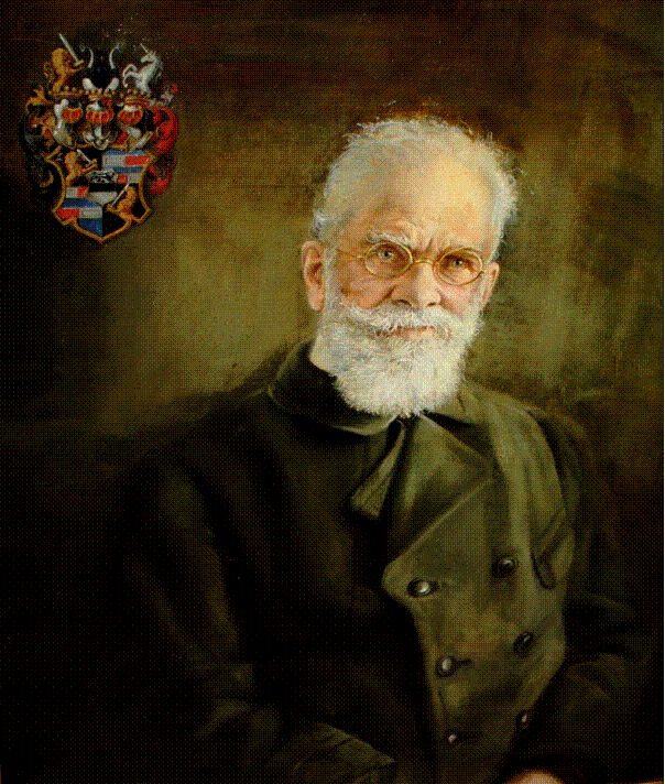 Sigmund von Pfetten, Reichstagsabgeordneter, Zentrum (1847-1931)